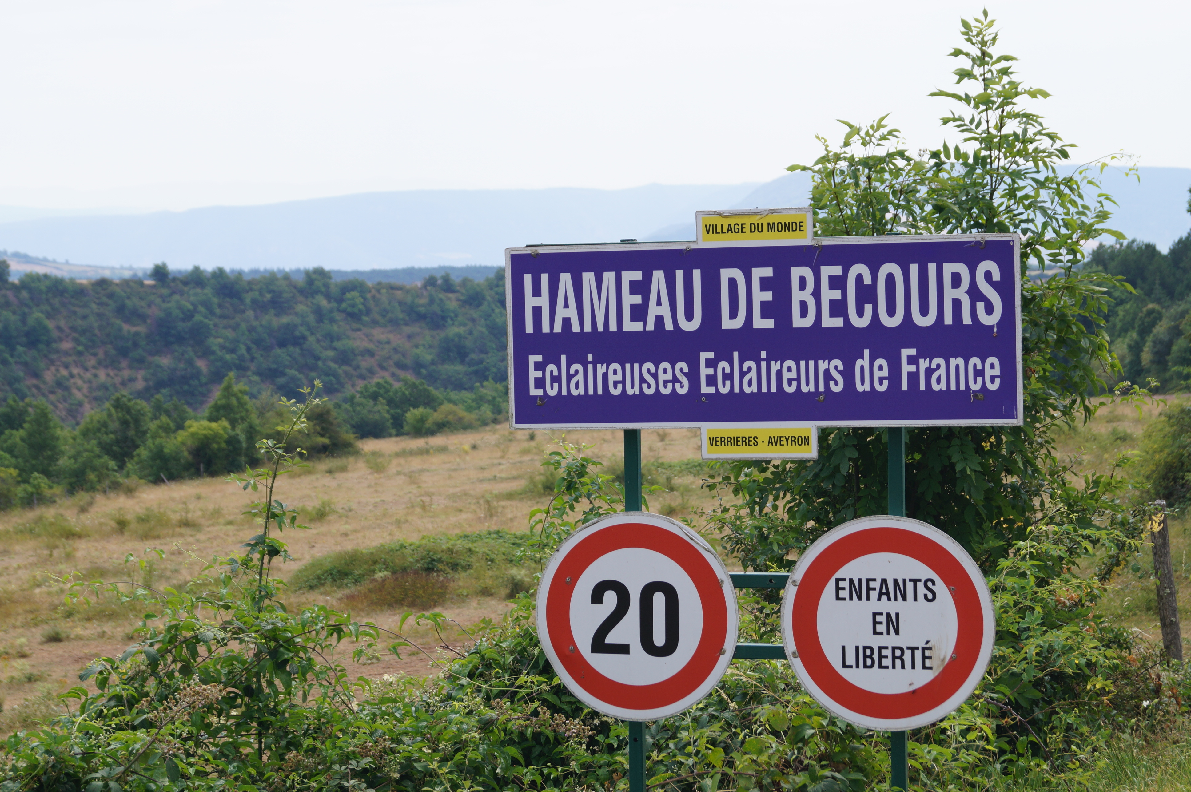 Panneau d'entrée du Hameau de Bécours, centre des Éclaireuses Éclaireurs de France. Il affiche une limitation de vitesse à 20km/h et l'annonce "Enfants en liberté"